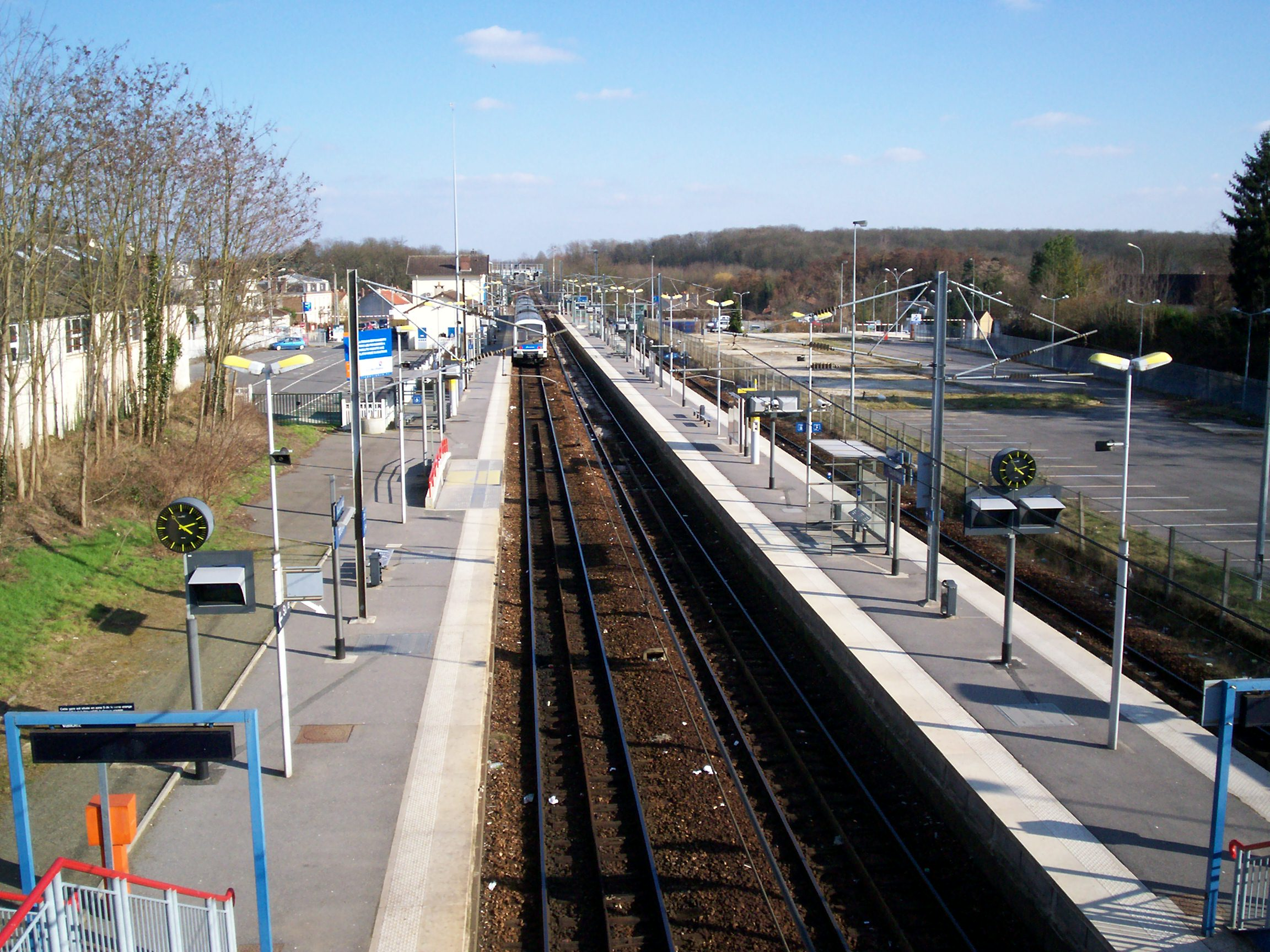 Vue aérienne de la gare de Tournan